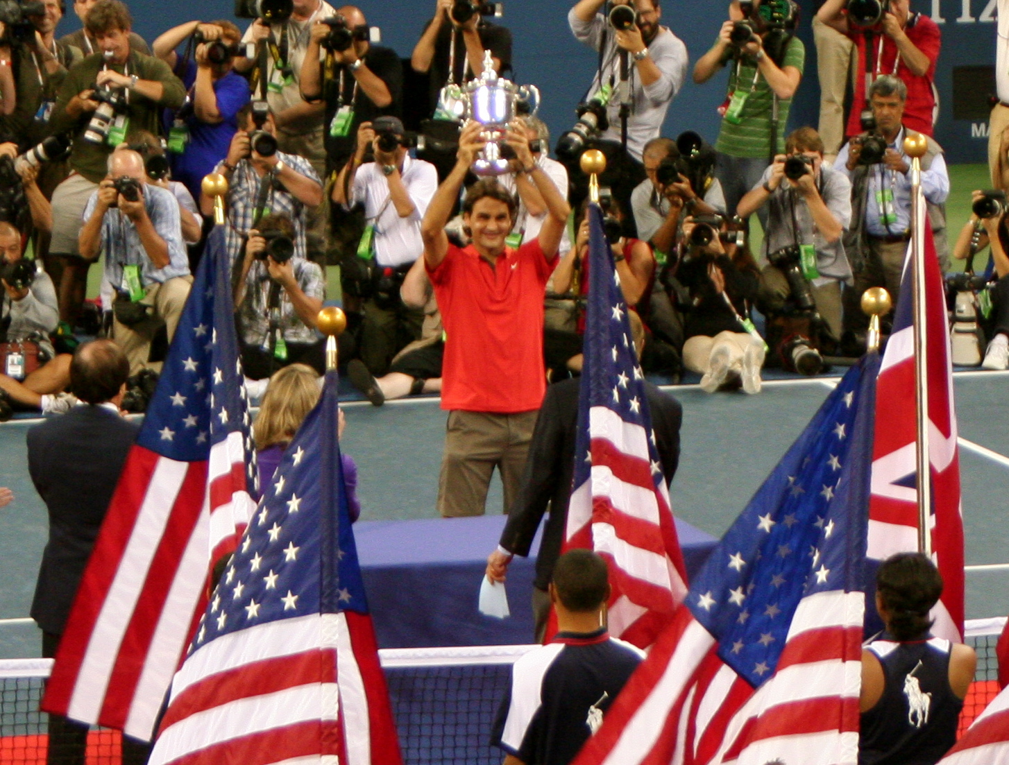 Roger Federer wins the US Open 2008